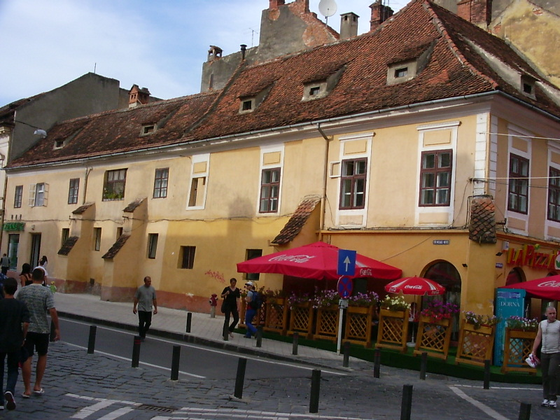 Jekelius house, Braşov/Kronstadt/Brassó